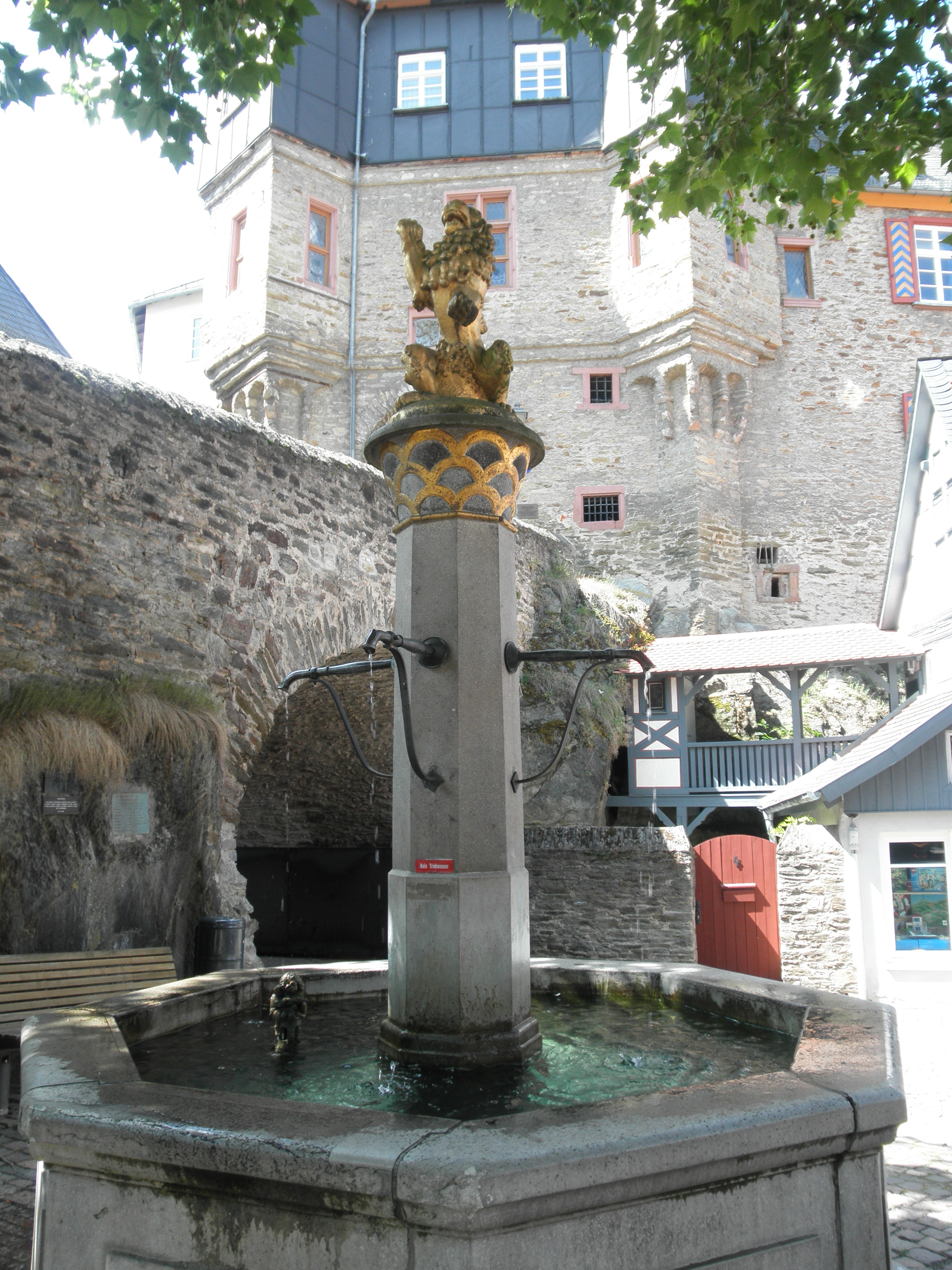 Löwenbrunnen auf dem König-Adolf-Platz in Idstein (Taunus); 1937 von Bildhauer Willy BierbrauerEsperanto: historia puto ĉe la centra placo König-Adolf-Platz de Idstein